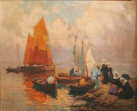 Henri Barnoin : Retour de pêche à Concarneau